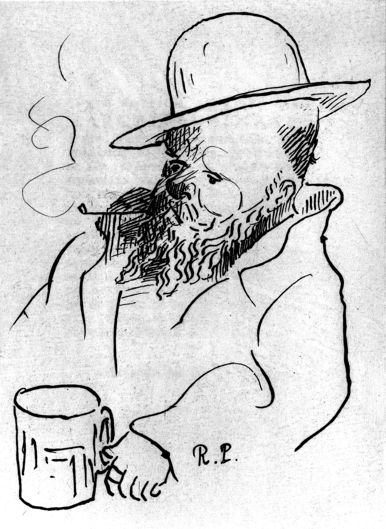 Frontispice de la Muse gaillarde, aux éditions Rieder, imprimé en 1939. Légende : Raoul Ponchon par lui-même.